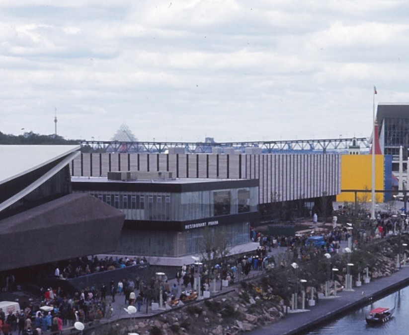 Československý pavilon na Světové výstavě (EXPO) 1967 v kanadském Montréalu.